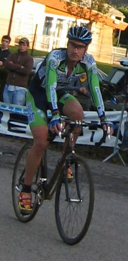 Le coureur cycliste français Christophe Laurent (Agritubel) lors du 3e cyclo-cross de la ville de Mende en novembre 2006. French cyclist from Agritubel, Christophe Laurent on november 2006 at the 3rd cyclo-cross grand prix of Mende